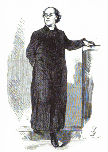 Joseph Lukas, Militärprediger und Mitglied des Zollparlaments, gezeichnet von Ludwig Löffler